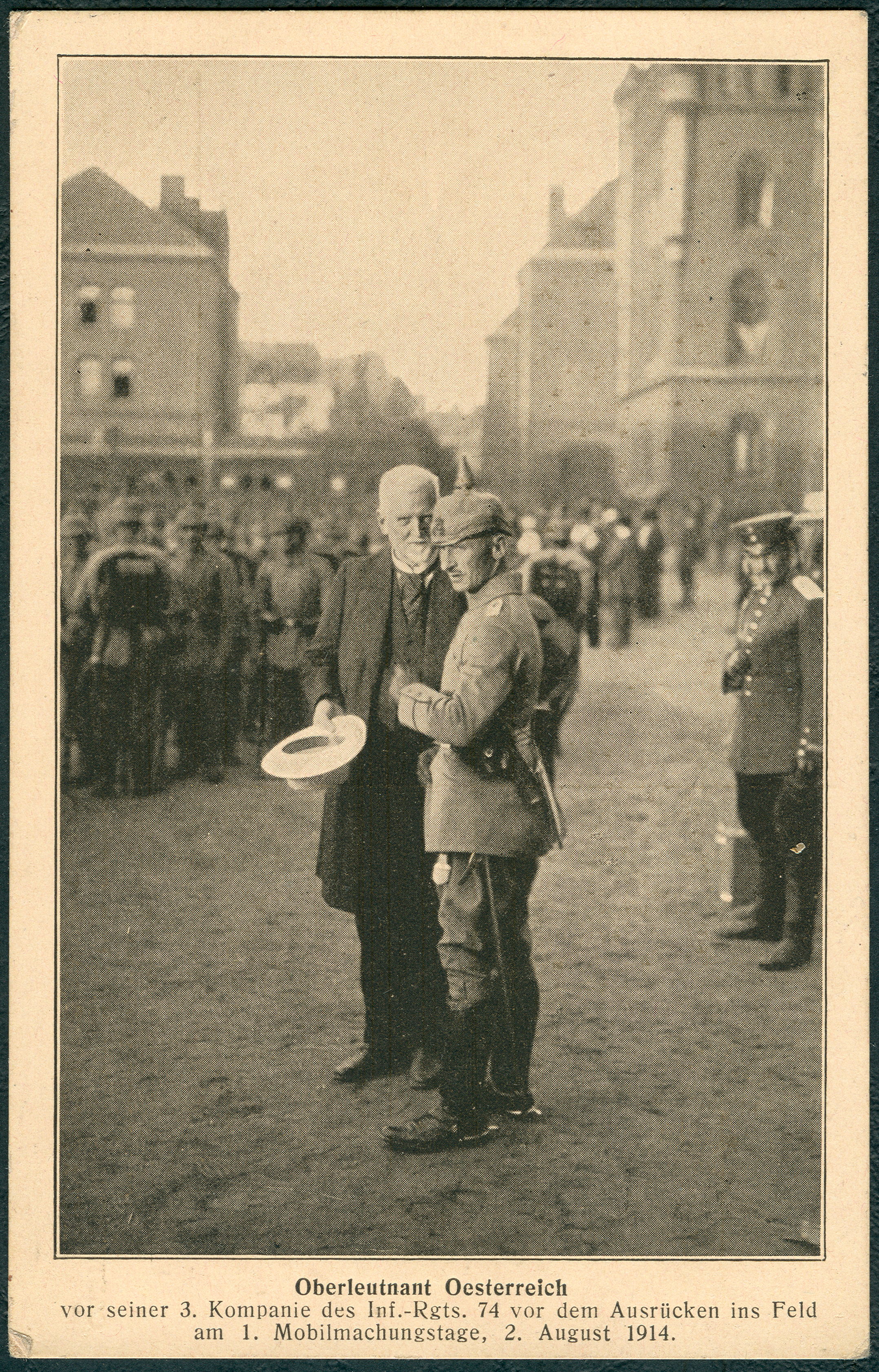 "Ansichtskarte" vom (sinngemäß) „1. Mobilmachungstage für den Ersten Weltkrieg am 2. August 1914“ beginnend mit dem „Antreten der 3. Kompanie 1. Hannoverschen Infanterie-Regiments Nr. 74 auf dem Kasernenhof am Welfenplatz.“ Nachdem "Oberleutnant Oesterreich" die Aufstellung überwacht hatte, konnte zunächst offenbar das "1. Bataillon" durch die auf dem Welfenplatz versammelte Volksmenge hindurch "ins Feld" ausrücken. Gegen Ende 1916 nahm der Unteroffiziert Henry Harland die als Postkarten reproduzierten Fotos, „Gewidmet von der Continental-Caoutchouc- und Gutta-Percha-Compagnie Hannover“ , um sowohl seiner lieben Schwester Fridel' und seinem Vater Wilhelm in der Angerstraße 8 in Hannover (Überlebens-)Nachrichten von der Westfront zukommen zu lassen. Inzwischen war der Unteroffizier offensichtlich der 11. Kompanie zugeteilt worden, die Feldpost-Stempel von der "19. Infanterie-Division".wurden teilweise jedoch „Aus militärischen Gründen verzögert.“ ...